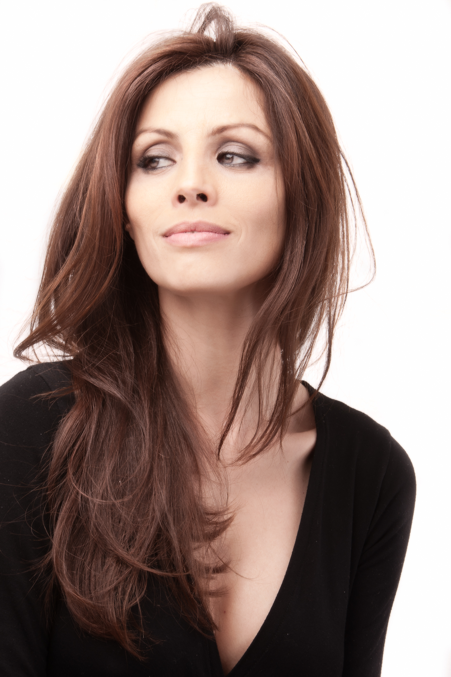 Ana Álvarez. Actriz española fotografiada por Gonzo Suárez